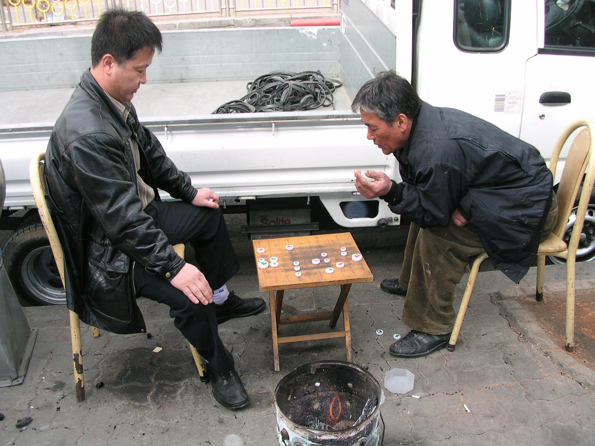 Dos trabajadores sentados junto a un fuego en su tiempo de descansando juegan a Janggi, el ajedréz coreano. La fotografía está tomada en 2006 en el barrio Yong-deong-po de la ciudad de Seul.